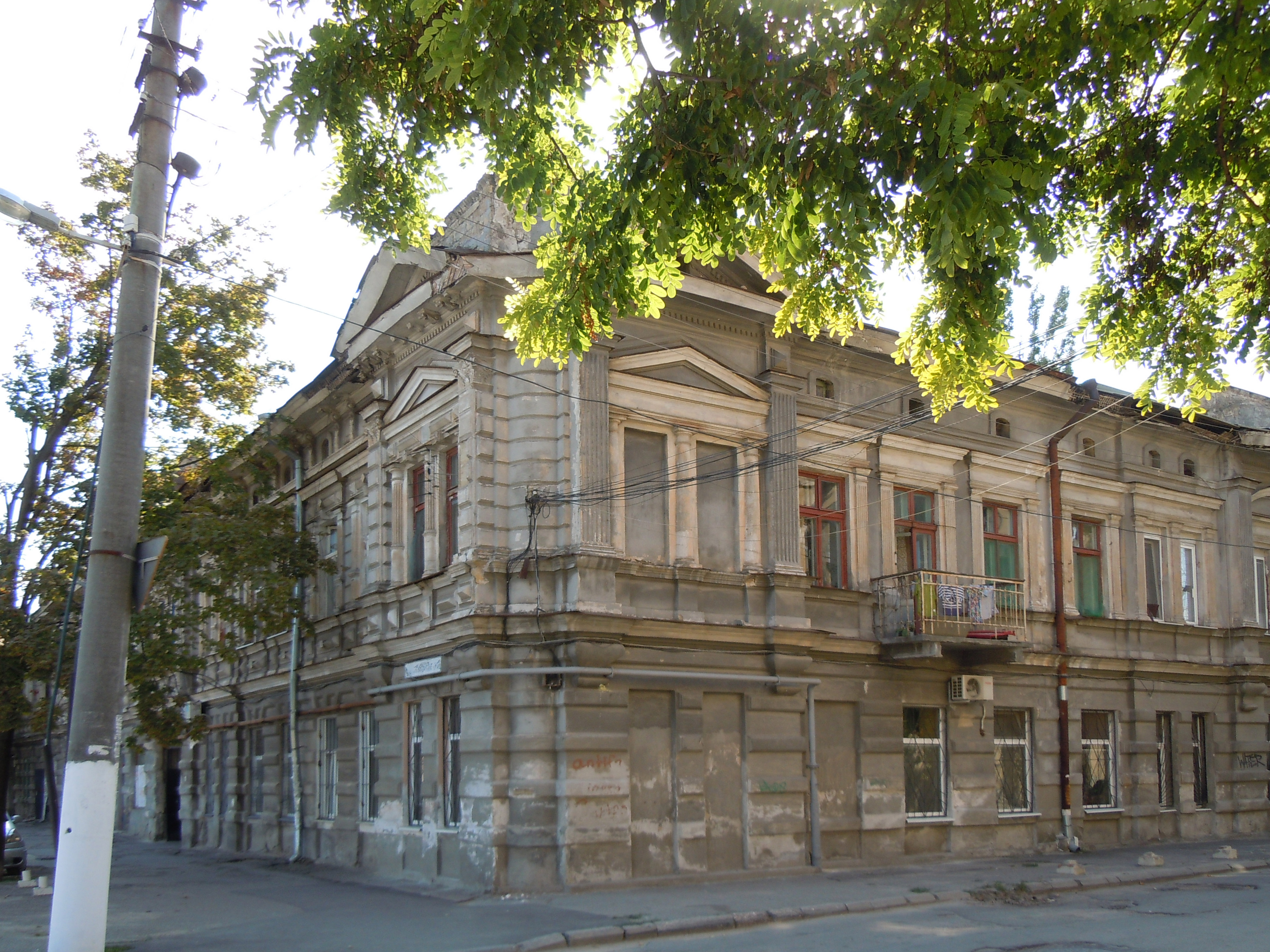 Будинок житловий, Одеса, Середньофонтанська вул., 12